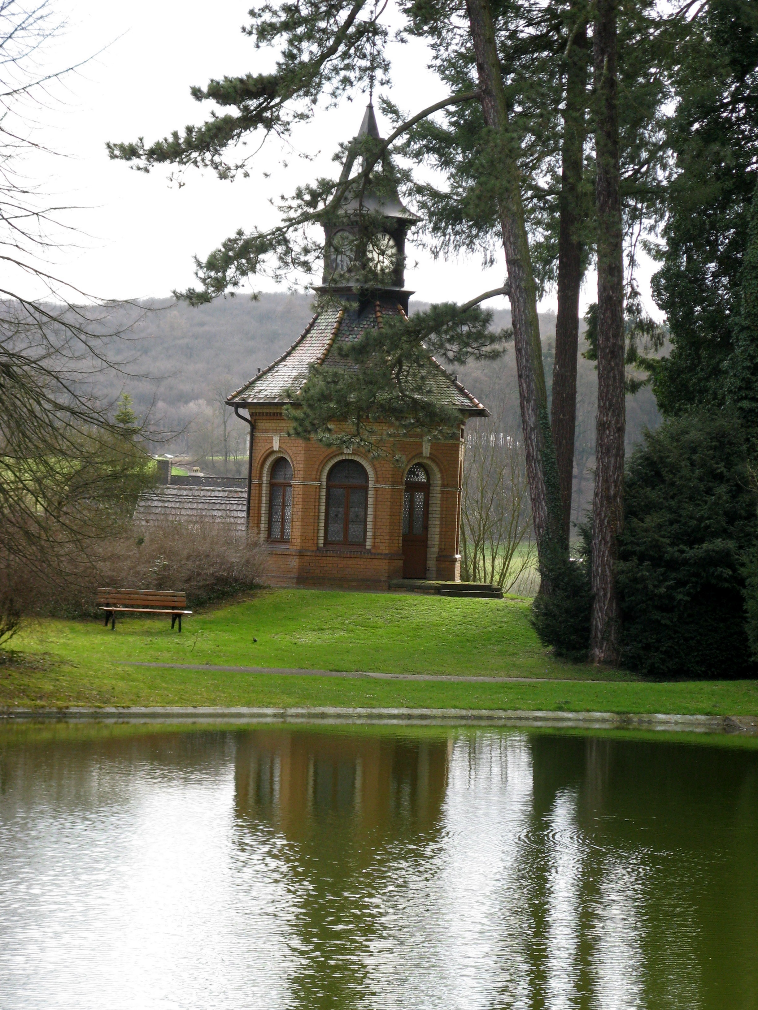 Kapelle im Gailschen Park Rodheim-Biebertal